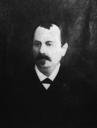 Επαμεινώνδας Κονιδάρης (1837-1897) ήταν Έλληνας ζωγράφος και ποιητής.